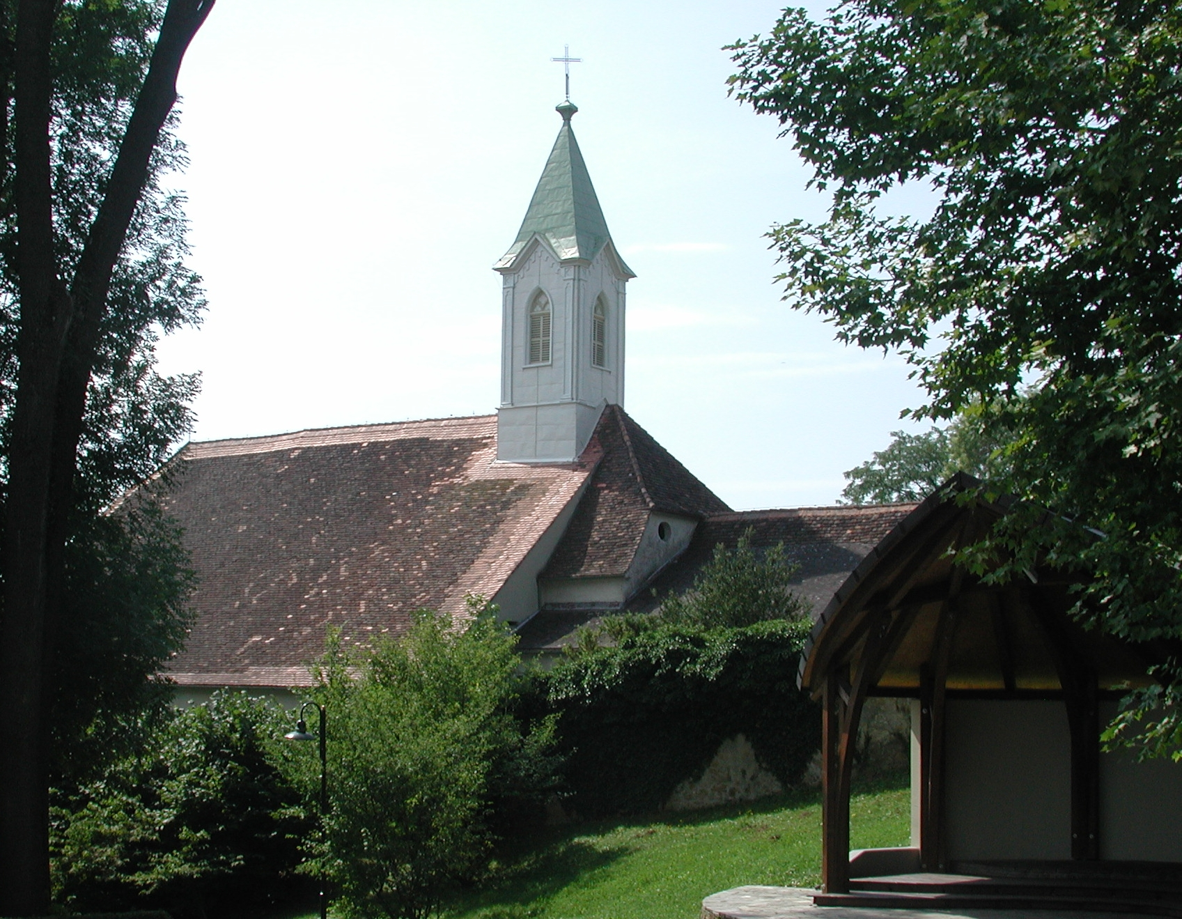 Die Hartberger Klosterkirche (Steiermark, Österreich)